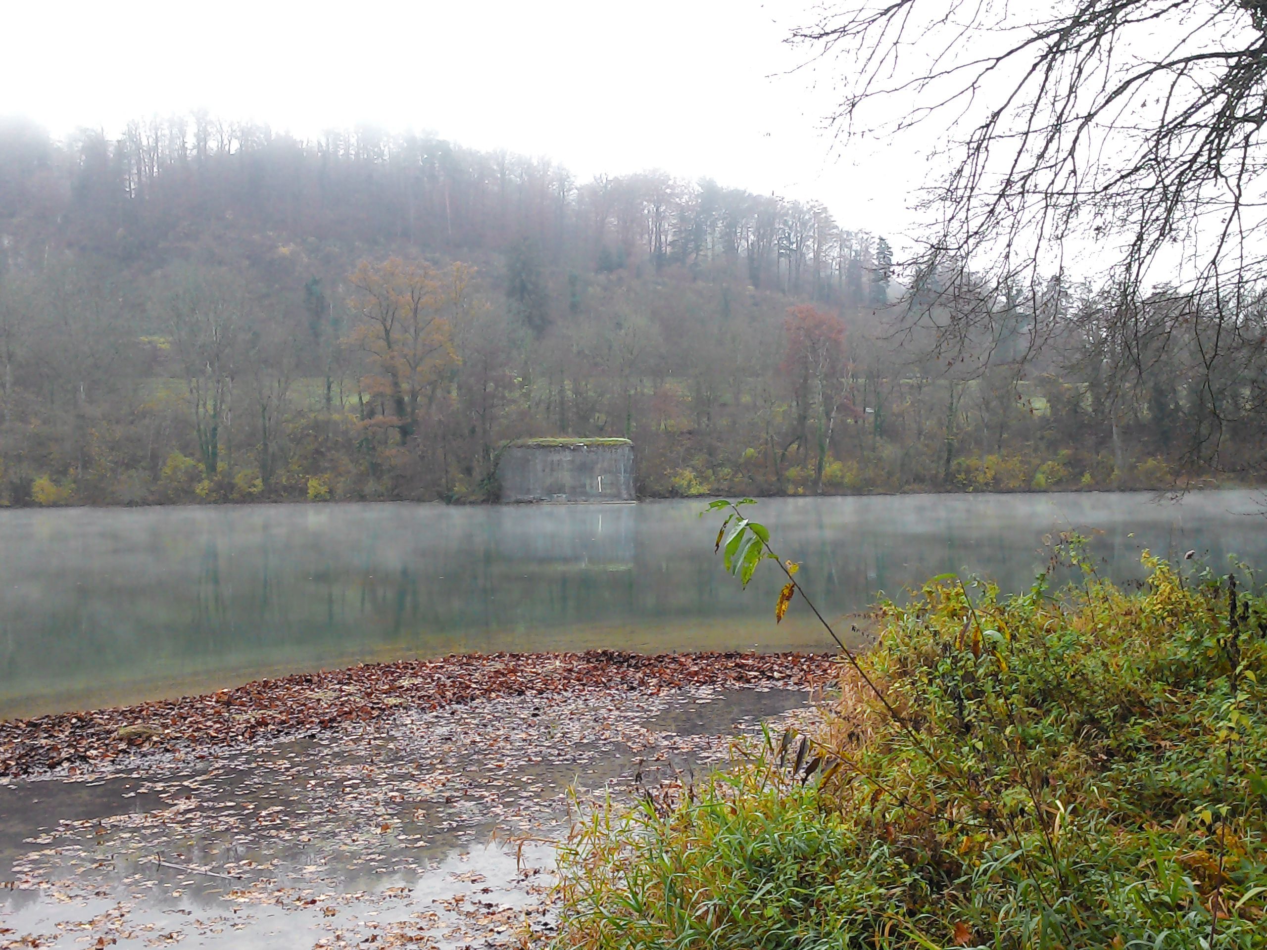 Blick vom Gelände Weisswasserstelz zum Platz der ehemaligen Burg Schwarzwasserstelz auf einer Rheininsel (heute mit Weltkriegsbunker bebaut). Vordergrund: Mündung Weilergraben. Hohentengen am Hochrhein, Landkreis Waldshut, Baden-Württemberg.